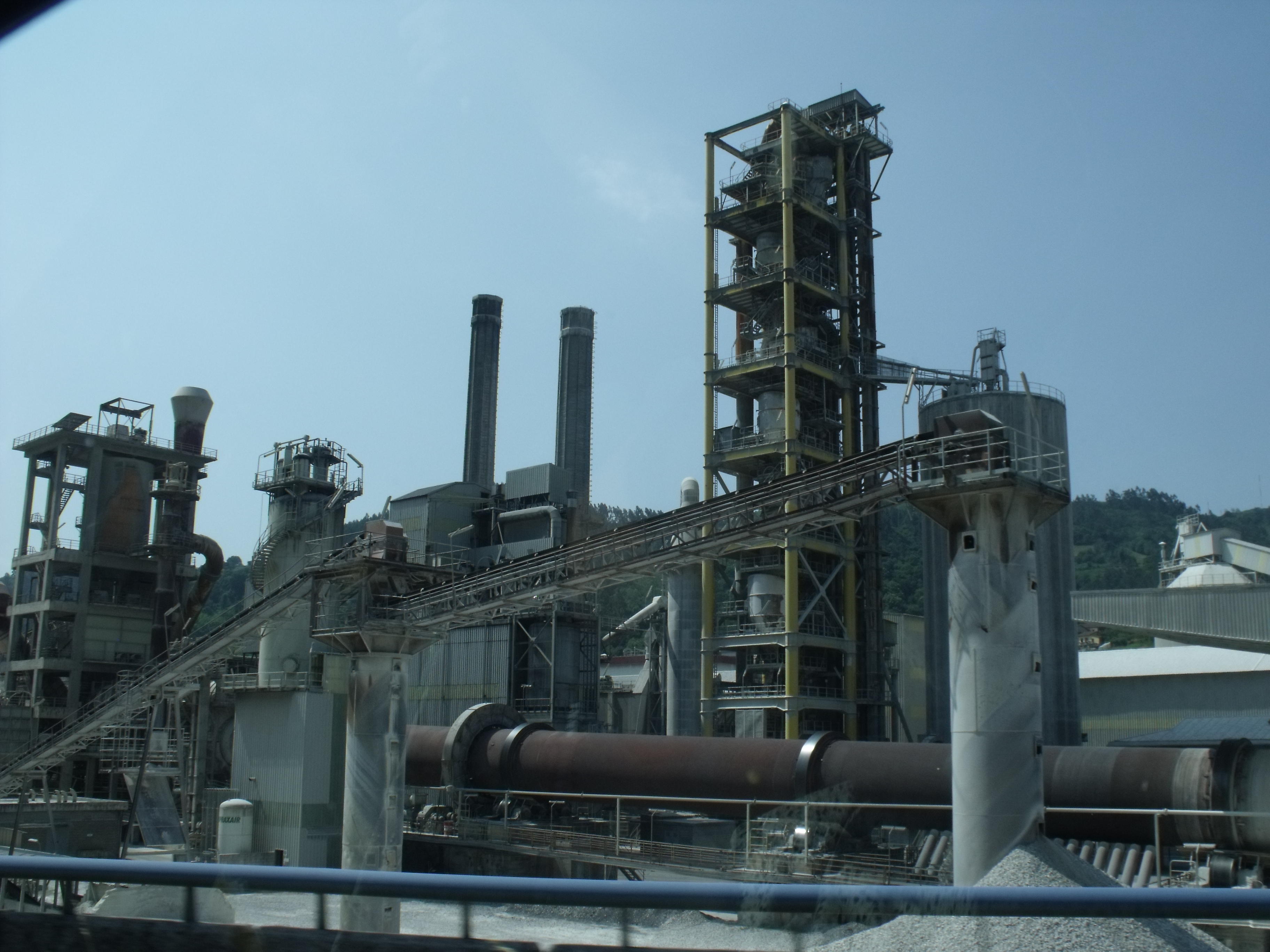 Industria cerca de Olloniego.